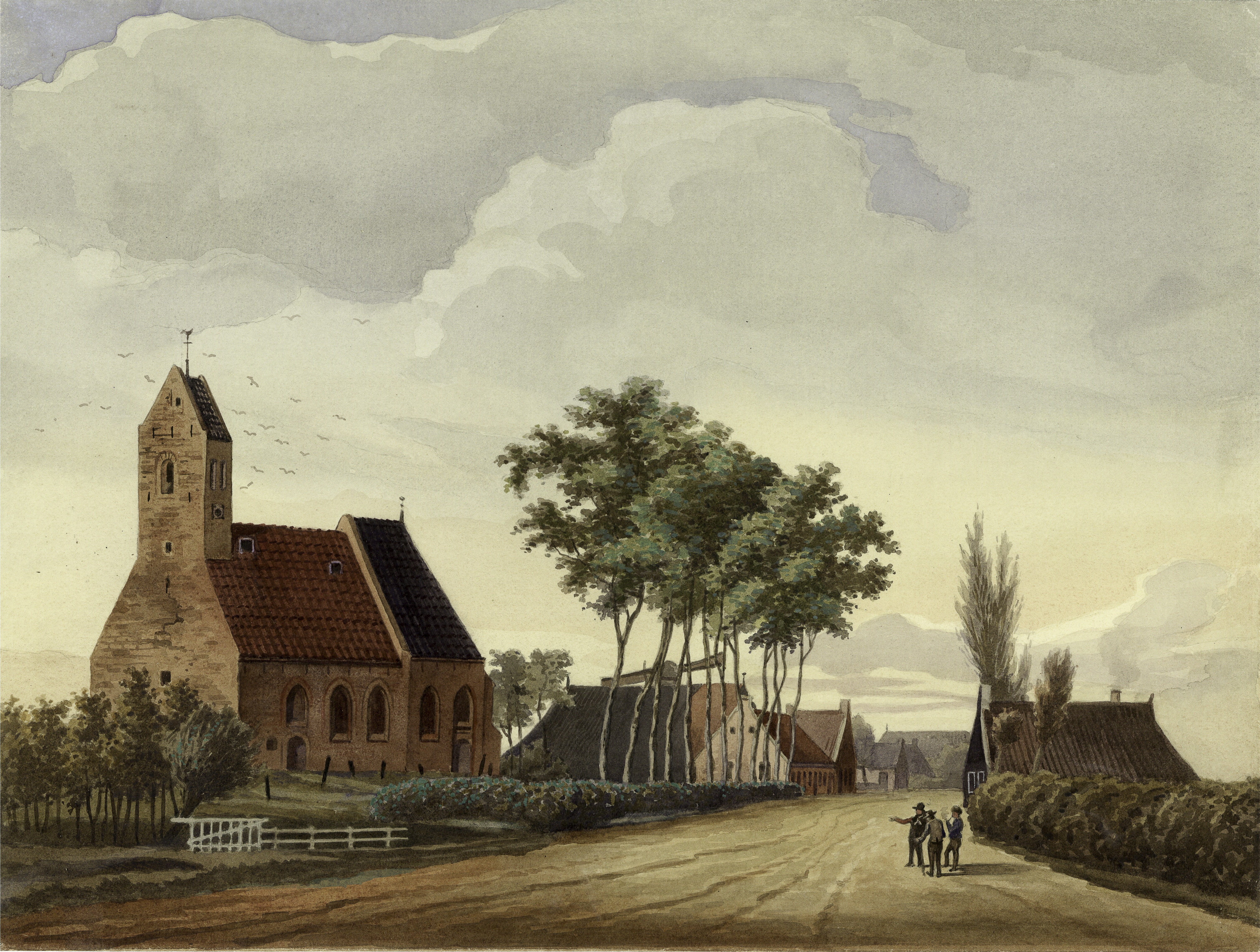 De vroegere kerk van Lutjegast op een schilderij uit 1908 naar een tekening van W. van der Veen uit de jaren 1860.